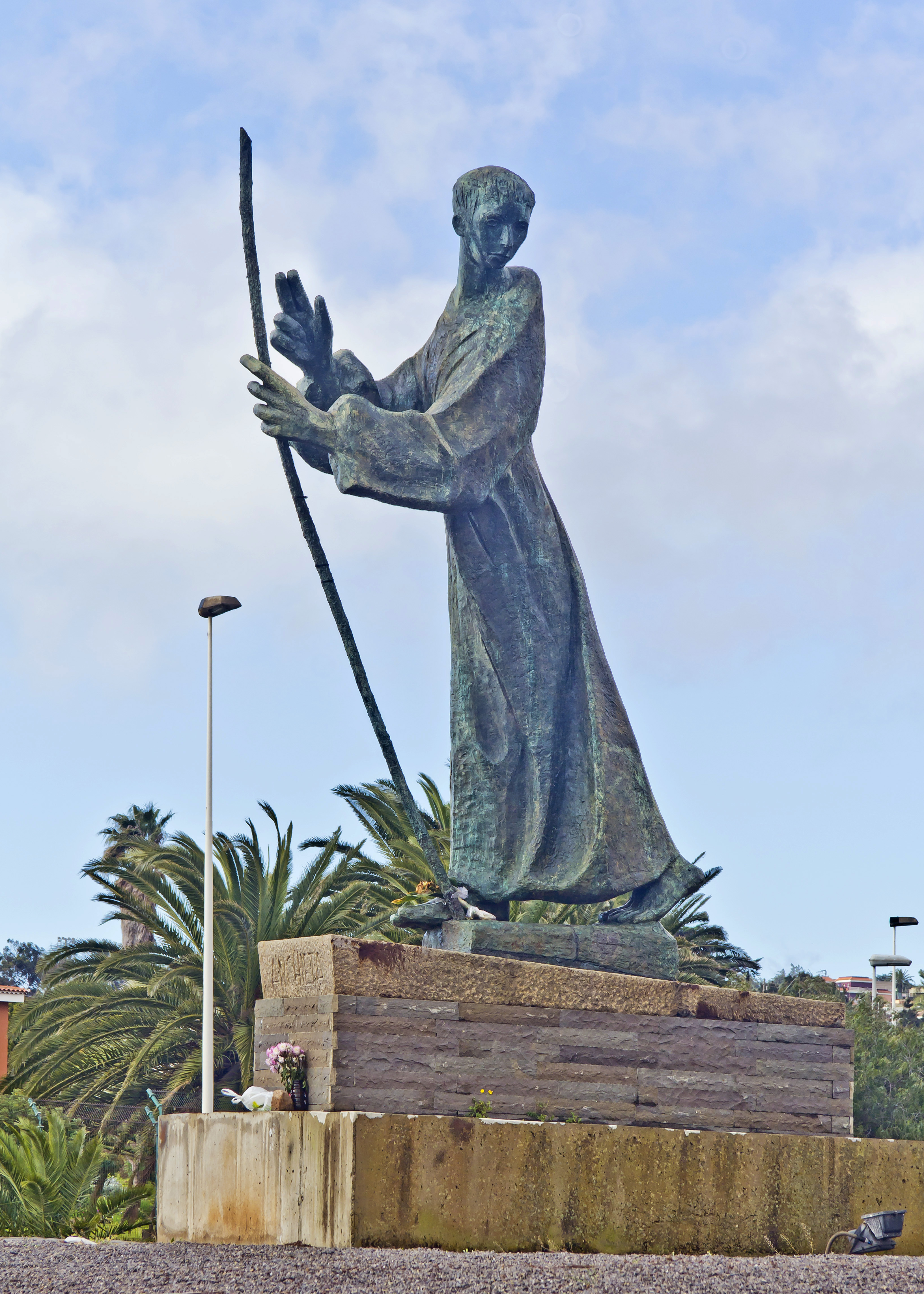 Escultura Padre Anchieta